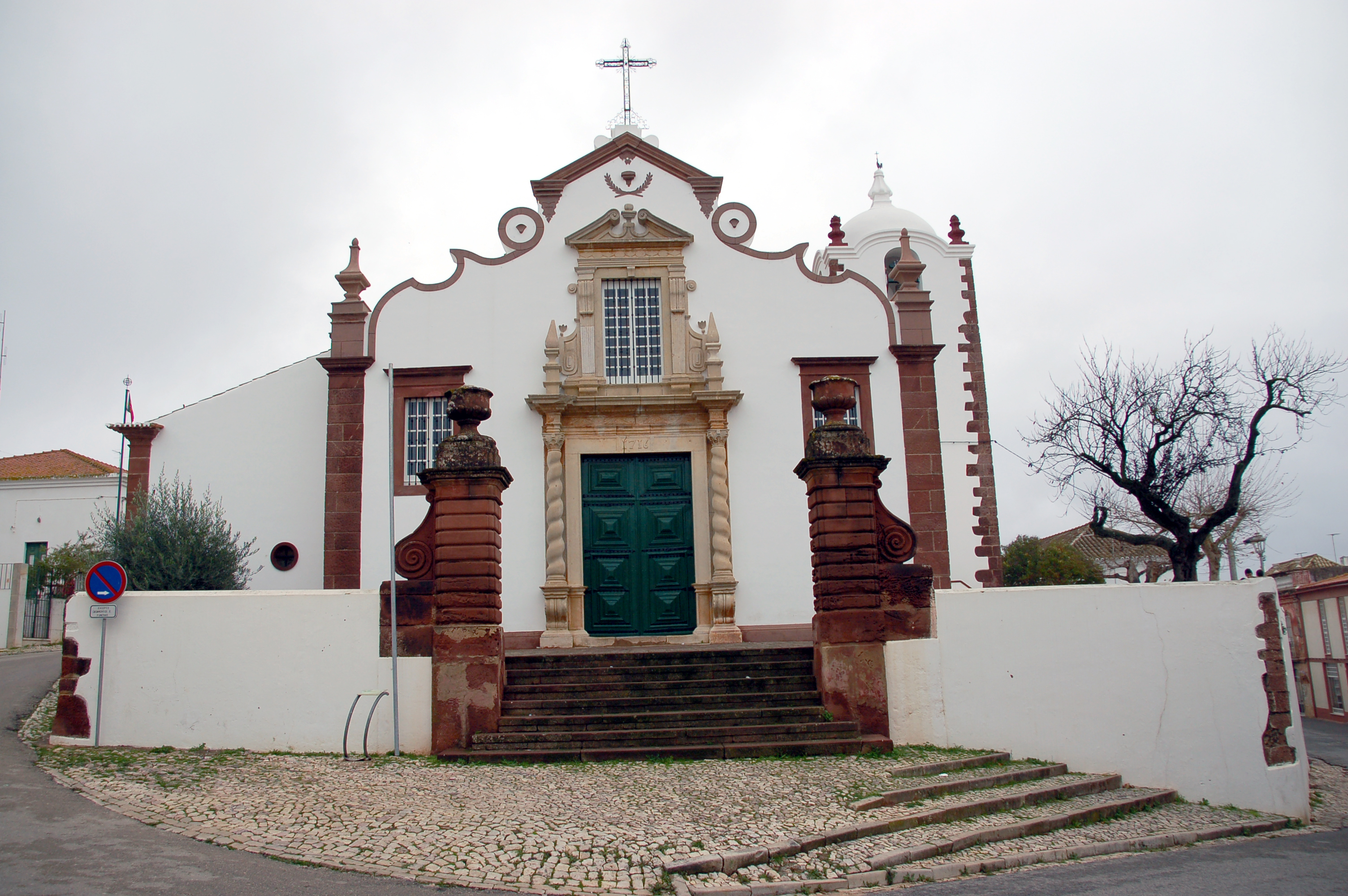 Construção de influência Manuelino.